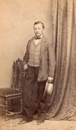 Fotografie von Michael Hoferer (1820-1890) in München um 1870.